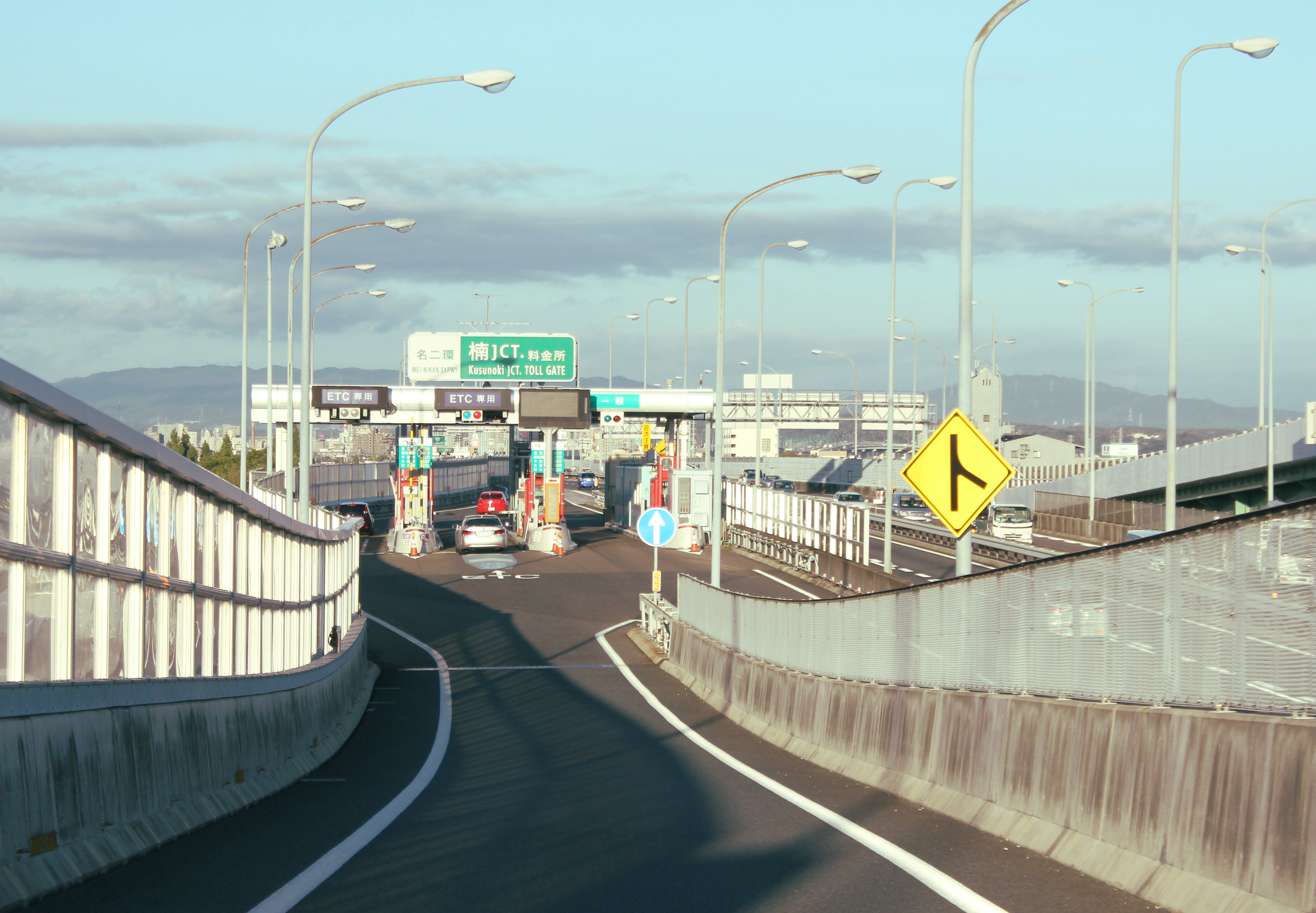 楠JCT料金所